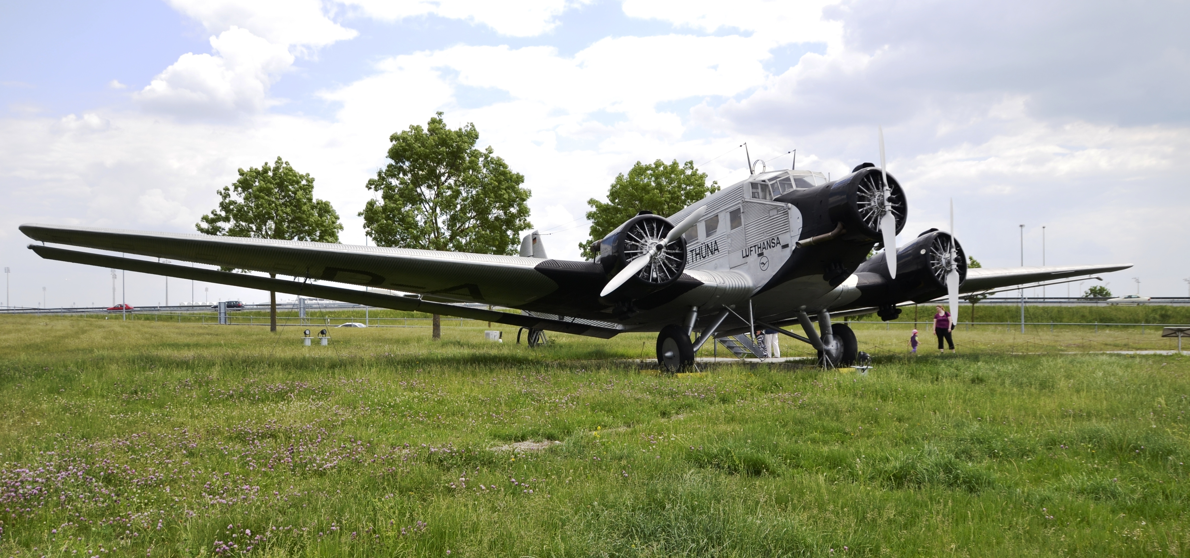 Eine Lufthansa Junkers Ju 52 / 3m (D-ANOY) am Besucherpark des Flughafens München. Es handelt sich hierbei nicht um die Originalmaschine des Pamirflugs von Carl August Freiherr von Gablenz, der im Jahr 1937 für die Lufthansa eine neue Flugroute über Hindukusch und Pamir nach China erschlossen hatte. Die originale D-ANOY stürzte 1938 nahe Wien ab und brannte aus.